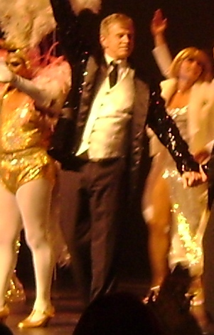 Miguel Falabella, ator brasileiro, ao final da apresentação do musical "A Gaiola das Loucas", em São Paulo.